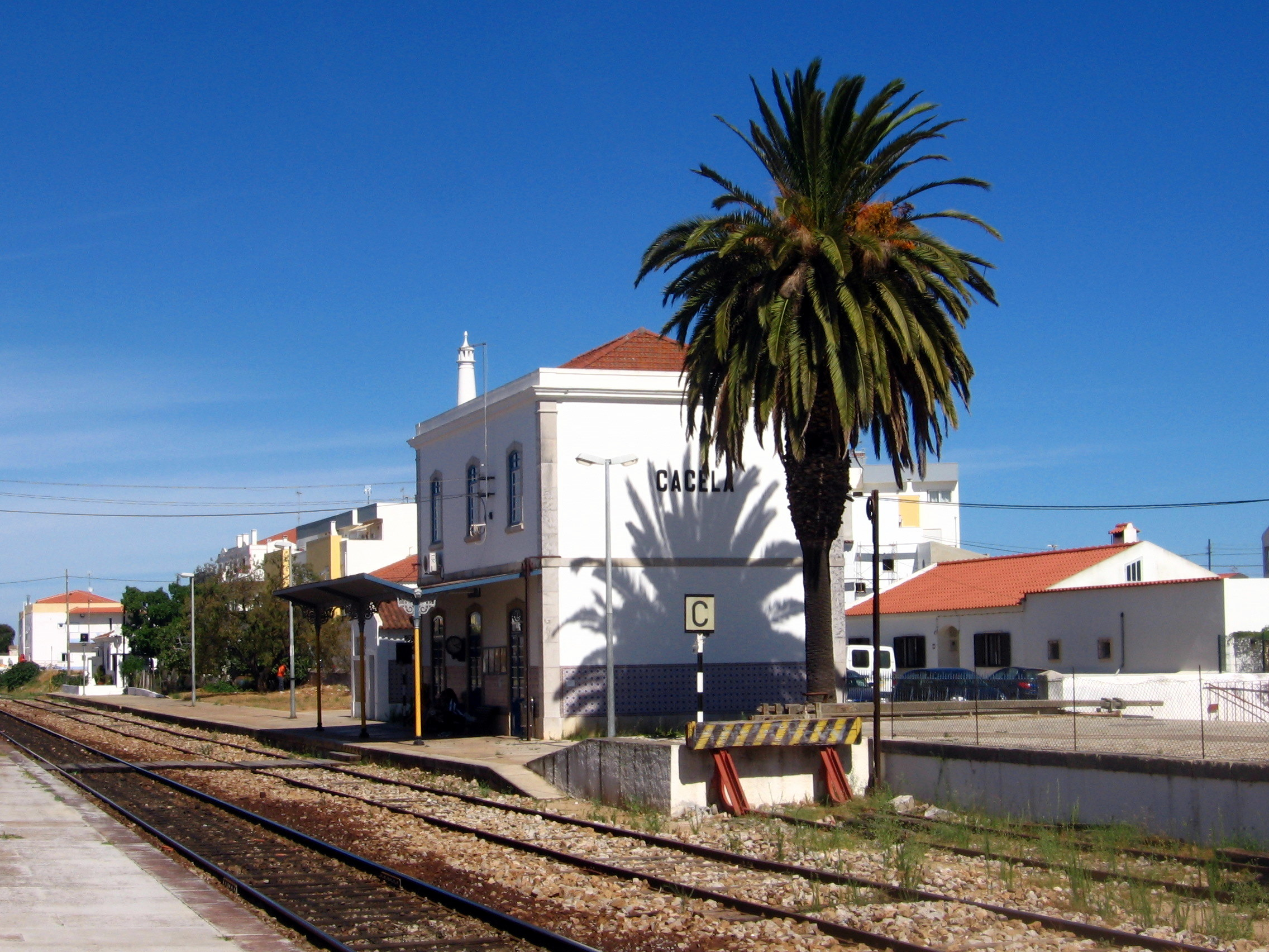 Estação ferroviária de Cacela, Algarve, Portugal